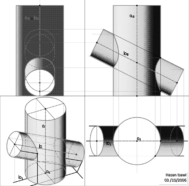 Per trovare la quartica d’intersezione, i piani ausiliari secanti da assumere: sono quelli paralleli agli assi dei due cilindri, poiché contengono i vertici impropri dei due cilindri.